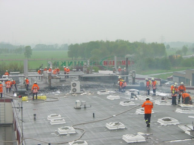 Großfeuer bei Abraham Schinken in Seevetal-Meckelfeld - rund 7,5 Mio EUR entstandener Schaden